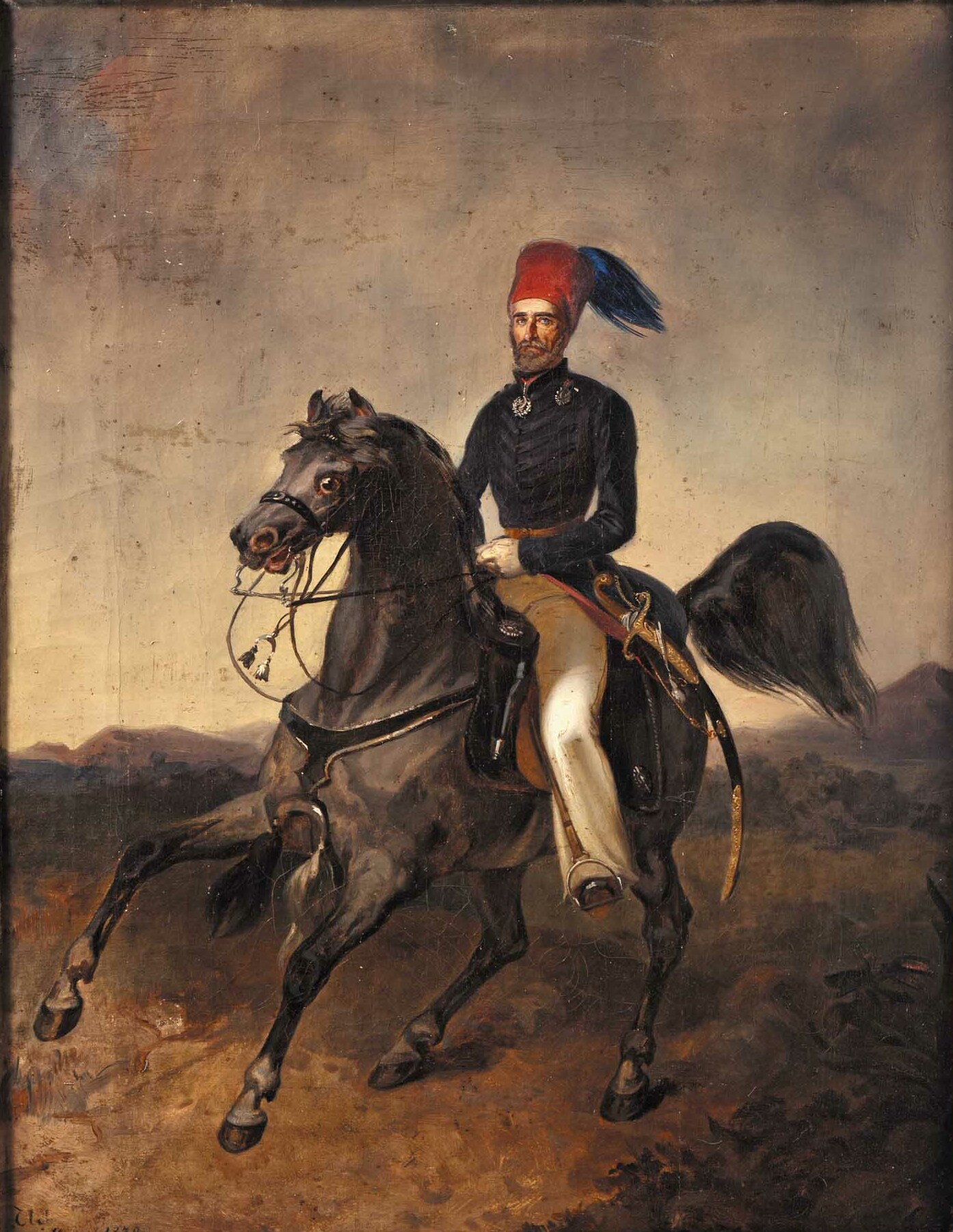 Traugott Wilhelm Heinrich von Mühlbach (* 17. Oktober 1795; † 18. Juli 1848), preußischer Major in türkischer Uniform, Träger des Pour le Merite, 1837-1839 als Ausbilder in der Türkei